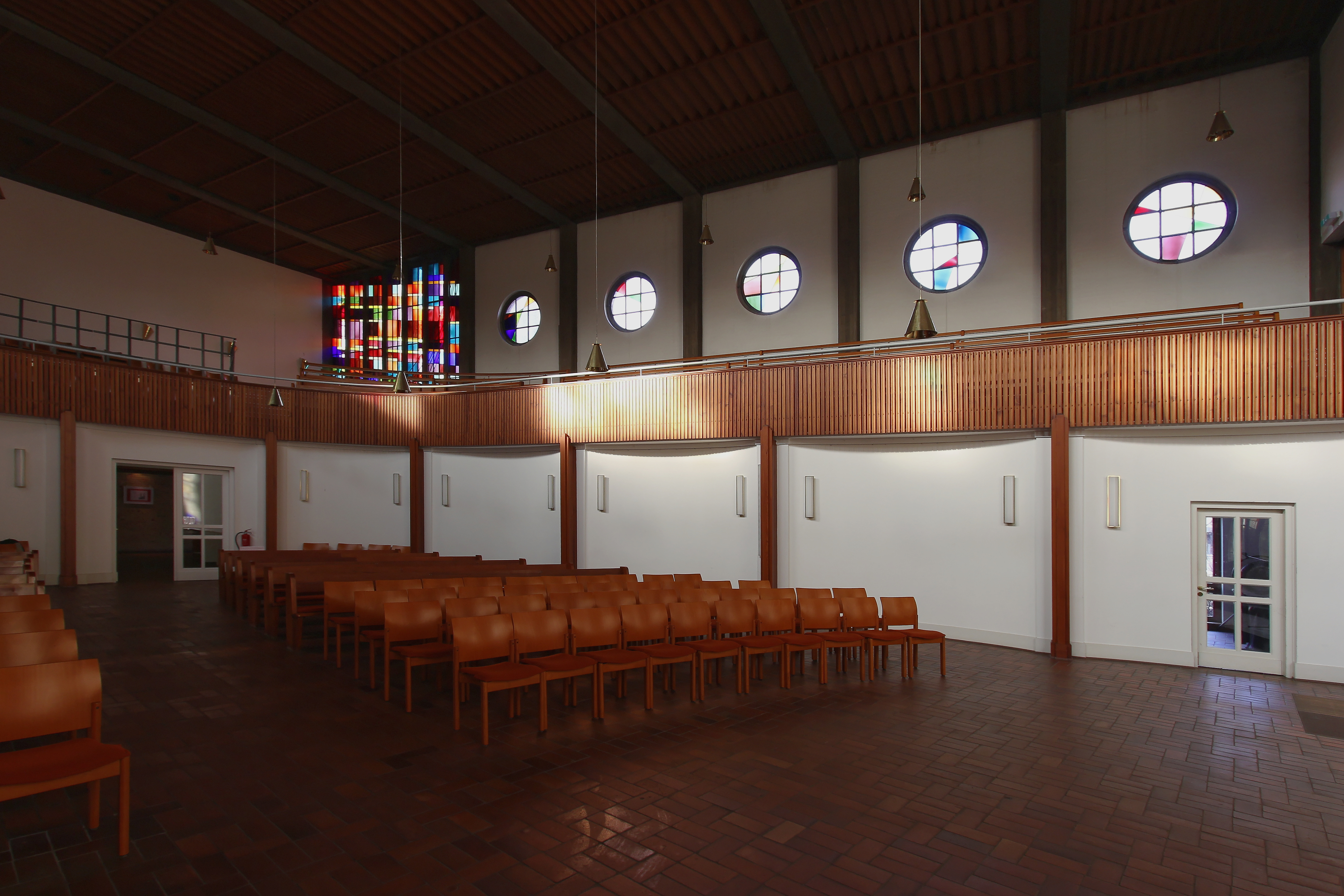 Hamburg-Harburg, St. Johannis Kirche, Innenraum Westempore This is a photograph of an architectural monument.